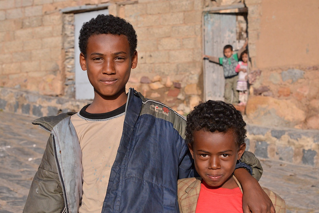 Yemen